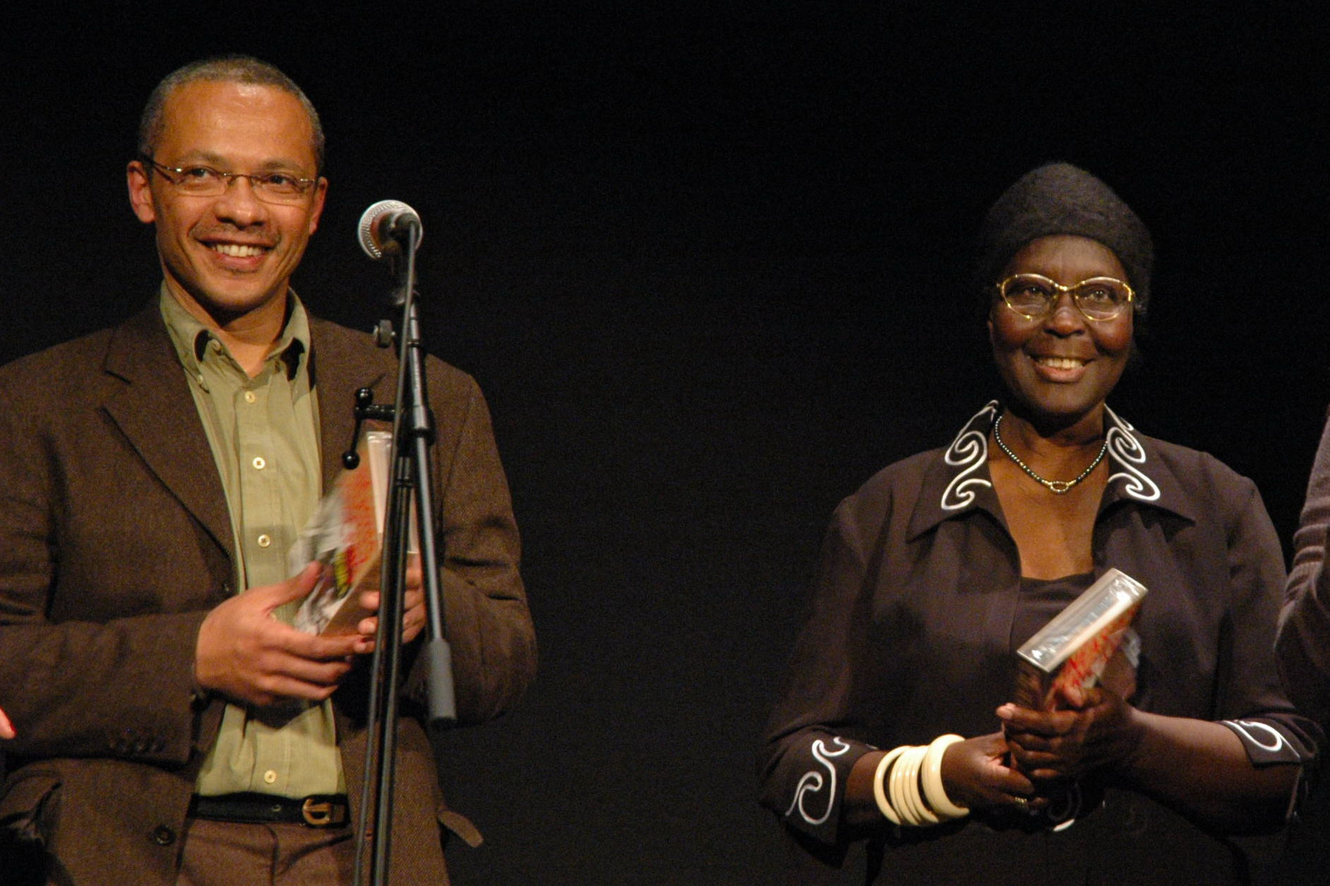 Le fils d'Ousmane Sembène, Alain Sembène, lors d'une soirée d'hommage à Ousmane Sembène à la Cinémathèque française le 18 février 2008